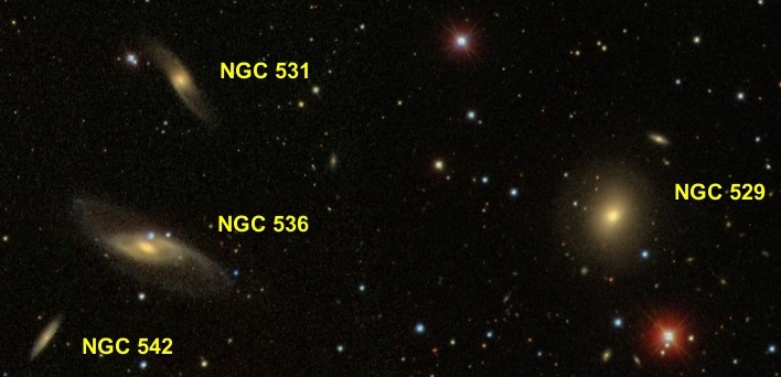 Le groupe compact de Hickson 10. Image créée à l'aide du logiciel Aladin Sky Atlas du Centre de Données astronomiques de Strasbourg et des données de SDSS (Sloan Digital Sky Survey).